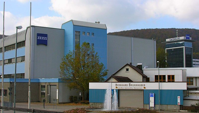 Oberkochen Die Carl Zeiss AG als wichtiger Wirtschaftsfaktor Foto 2009 Wolfgang Pehlemann Wiesbaden IMG_4182